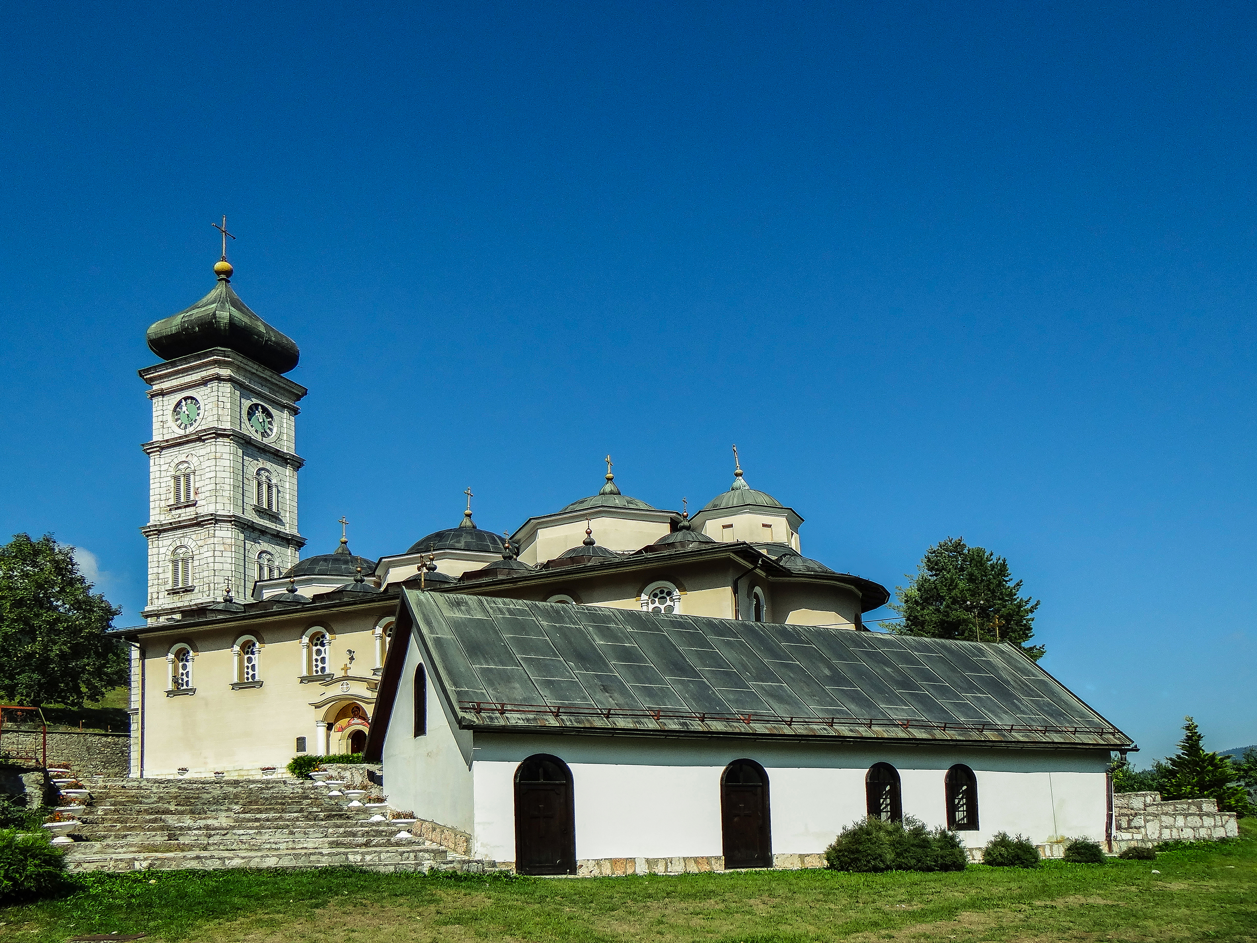 This image was uploaded as part of Trace of Soul 2016. Crkva Uspenja Bogorodice u Čajniču